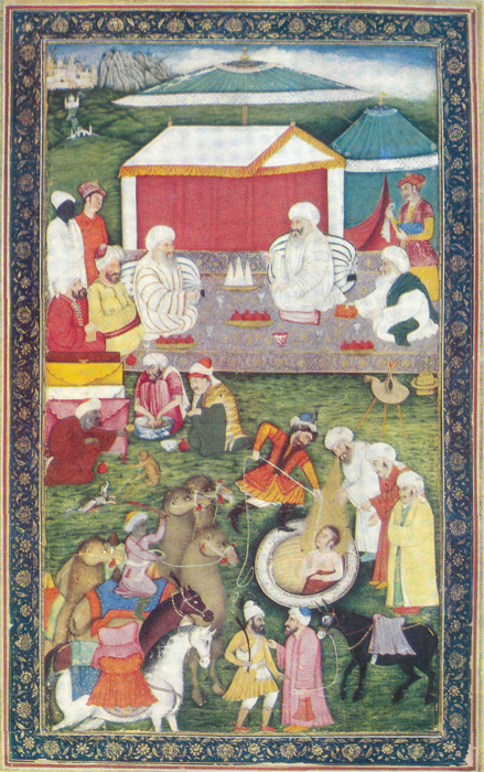 Мухаммед-Надир Самарканди. КУПЦЫ ИЗВЛЕКАЮТ ЮСУФА ИЗ КОЛОДЦА, Альбом индийских и персидских миниатюр. Рукопись ГПБ, Дорн 489. 1616 г. Выполнена в Кашмире